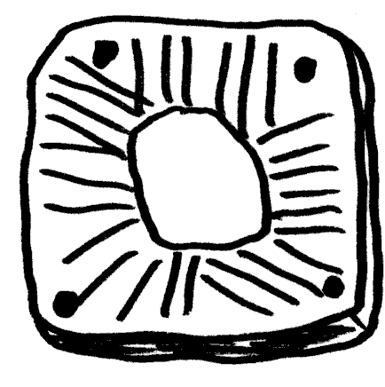 Plaqueta grabada con soliforme del castro portugués de Vila Nova de São Pedro (Portugal)